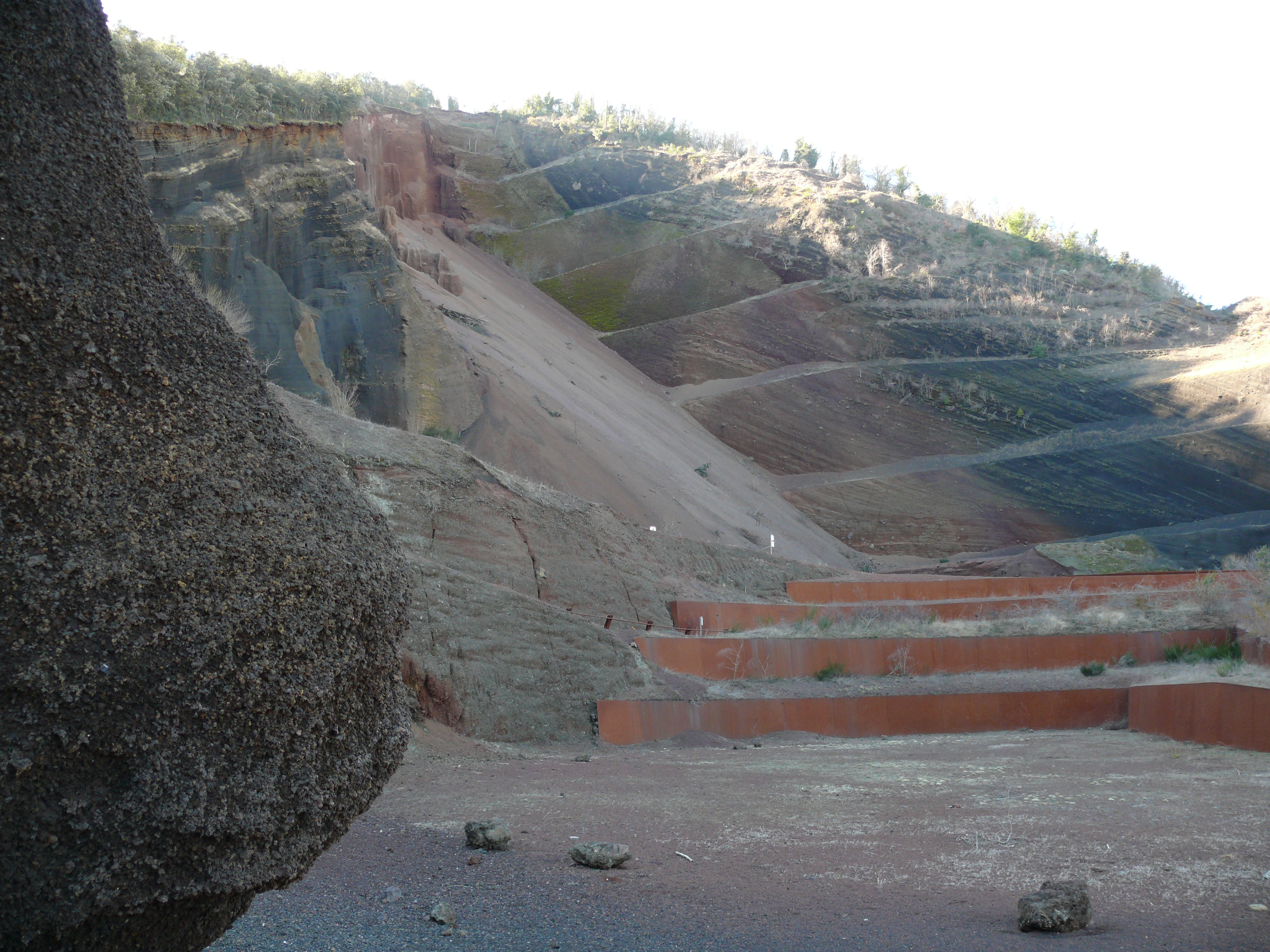 Volcà del Croscat This is a a photo of a natural area in Catalonia, Spain, with id: ES510010